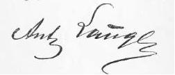 Autograf Langego (1863-1929)